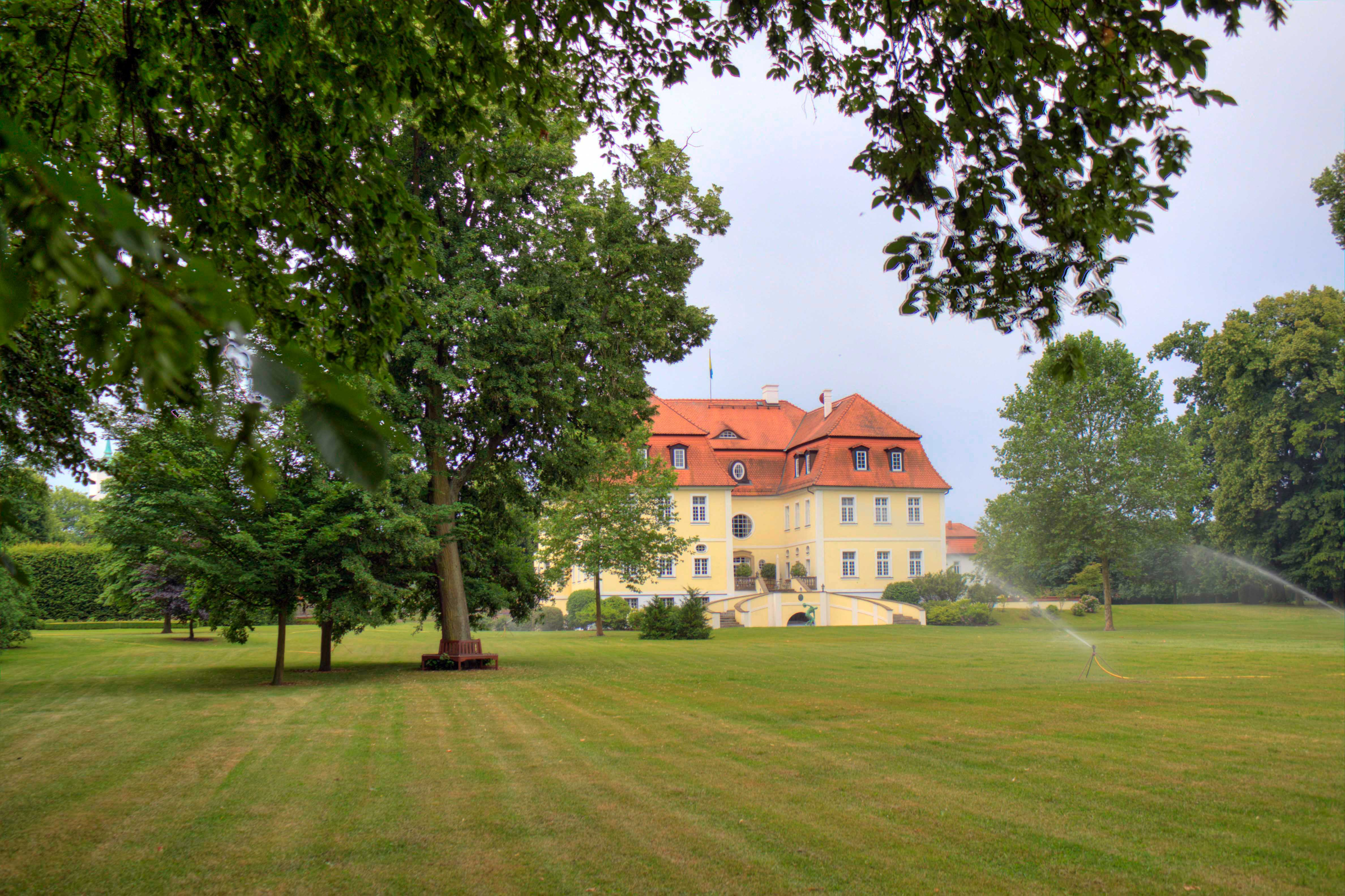 Herrenhaus Rittergut Stechau